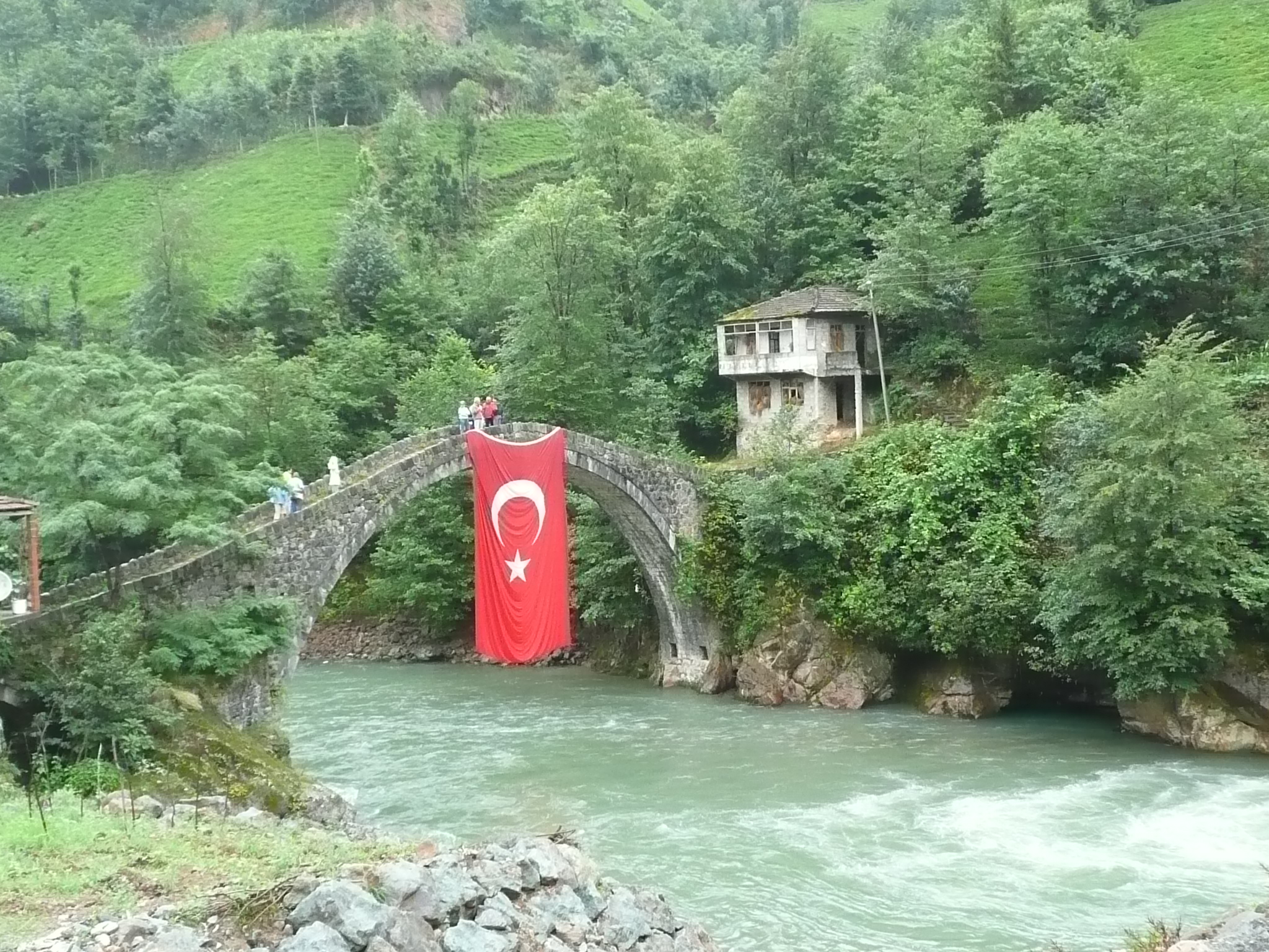 hamsiköy